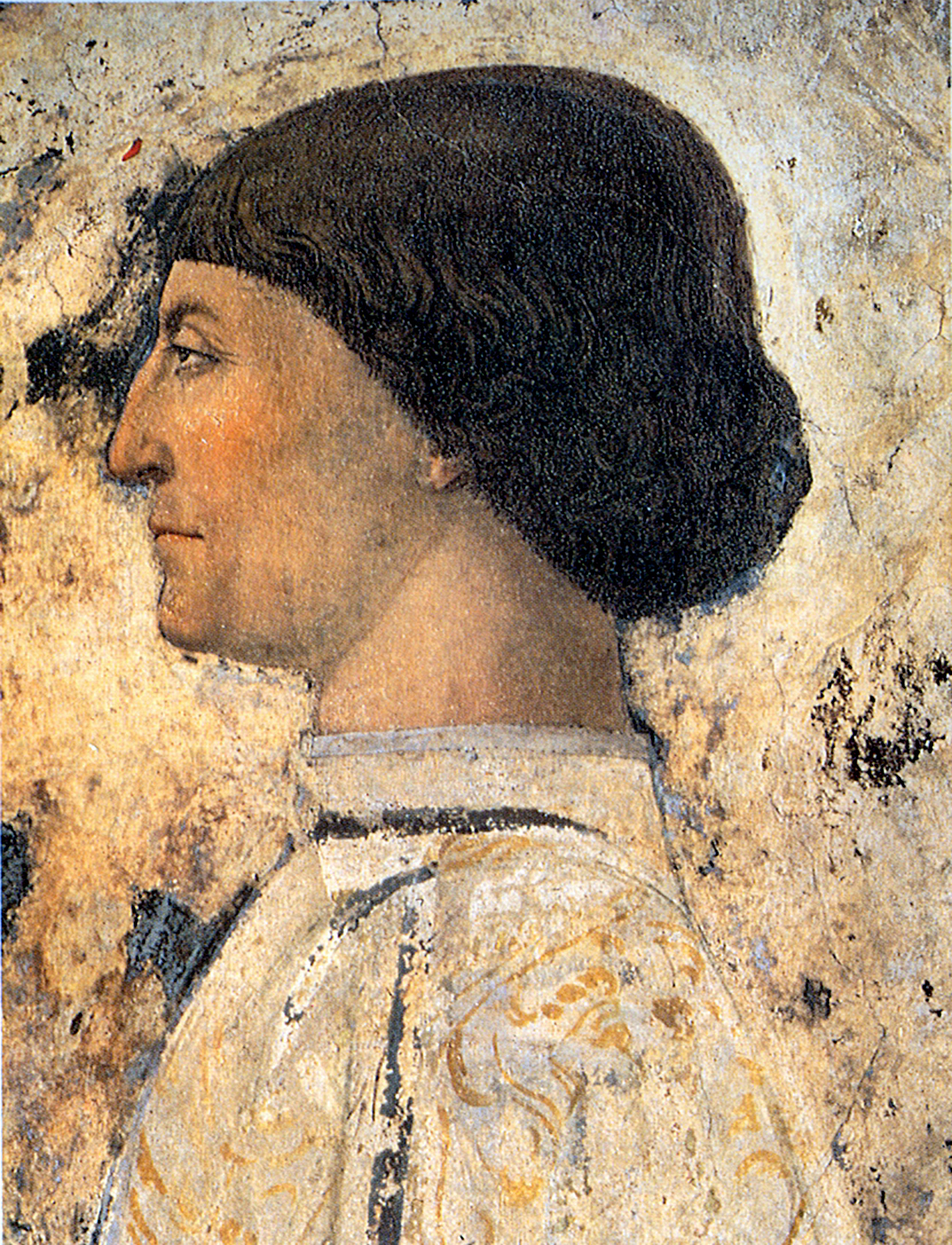 Sigismondo Pandolfo Malatesta before Saint Sigismund Piero della Francesca Fresco, 257 x 345 cm Rimini, Tempio Malatestiano